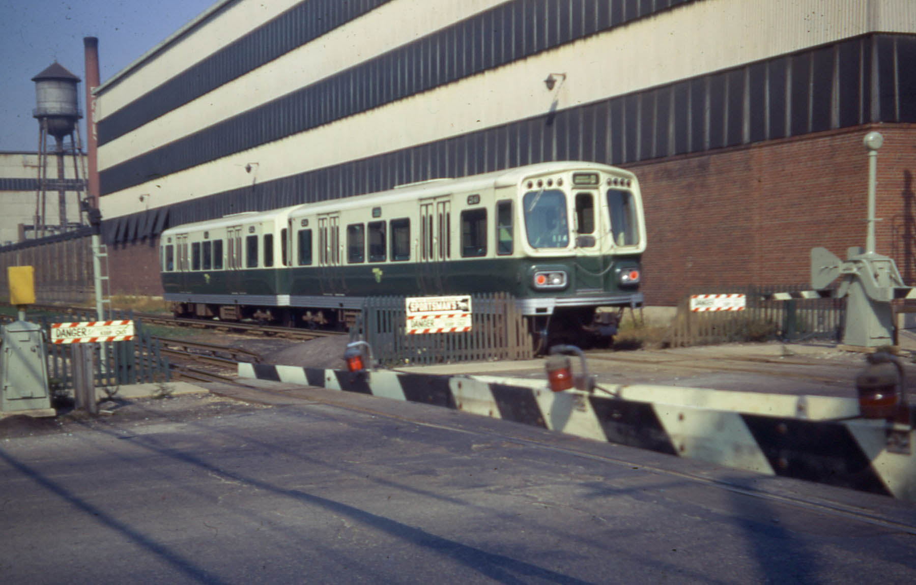 19670906 01 CTA 2141 @ Laramie Ave